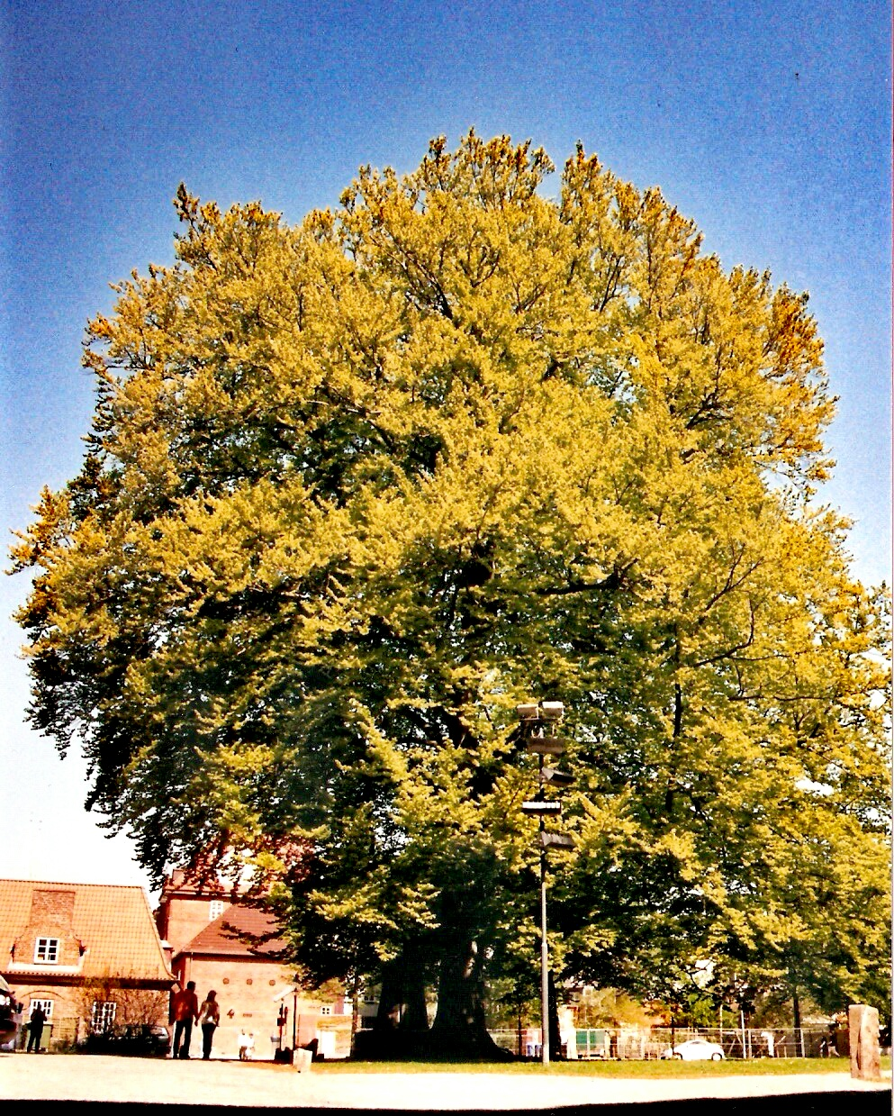 Ein Sprössling von der Lutherbuche zu Liebenstein in Thüringen